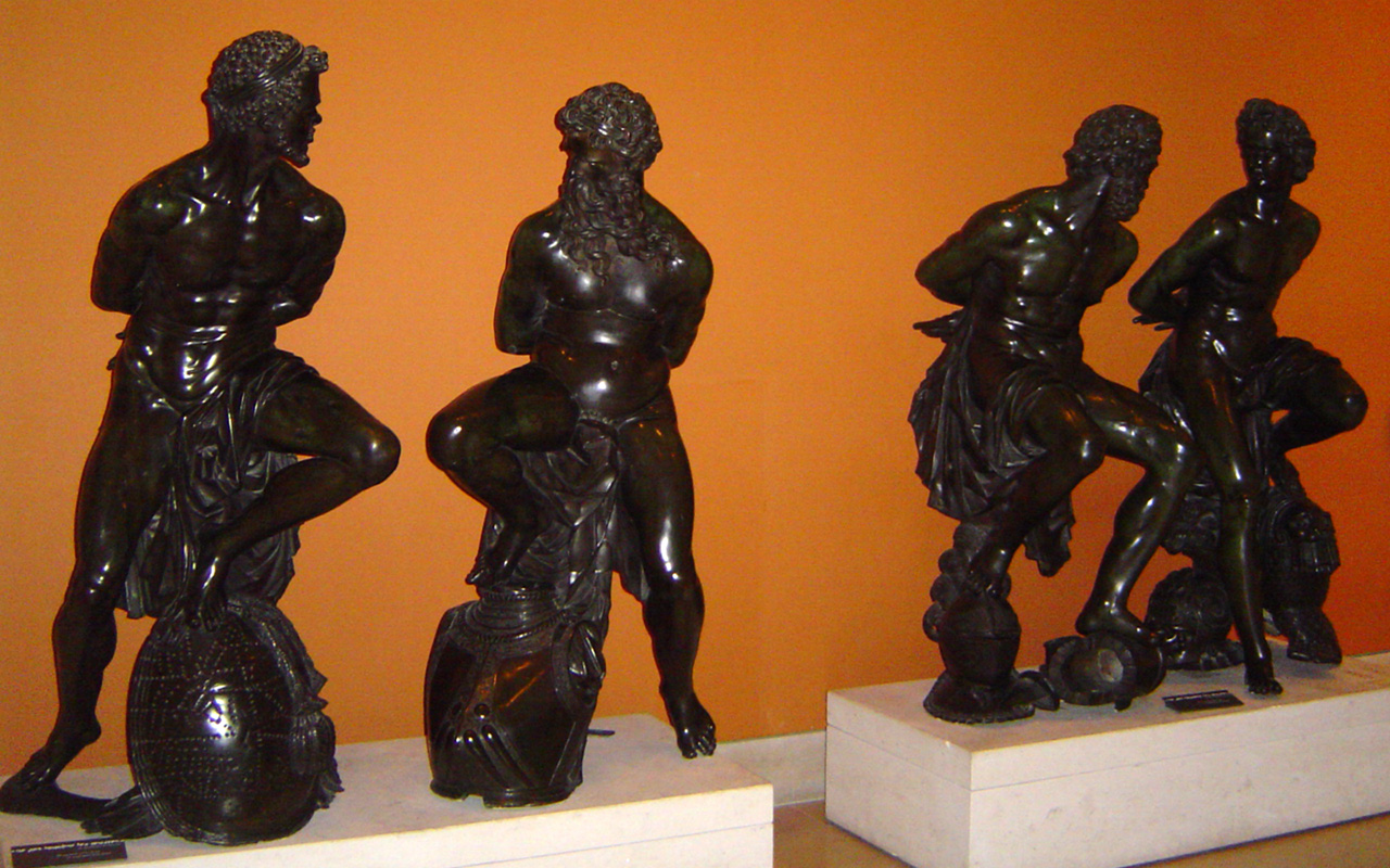 Quatre Captifs appartenant au piédestal de la Statue équestre d'Henri IV du Pont Neuf.